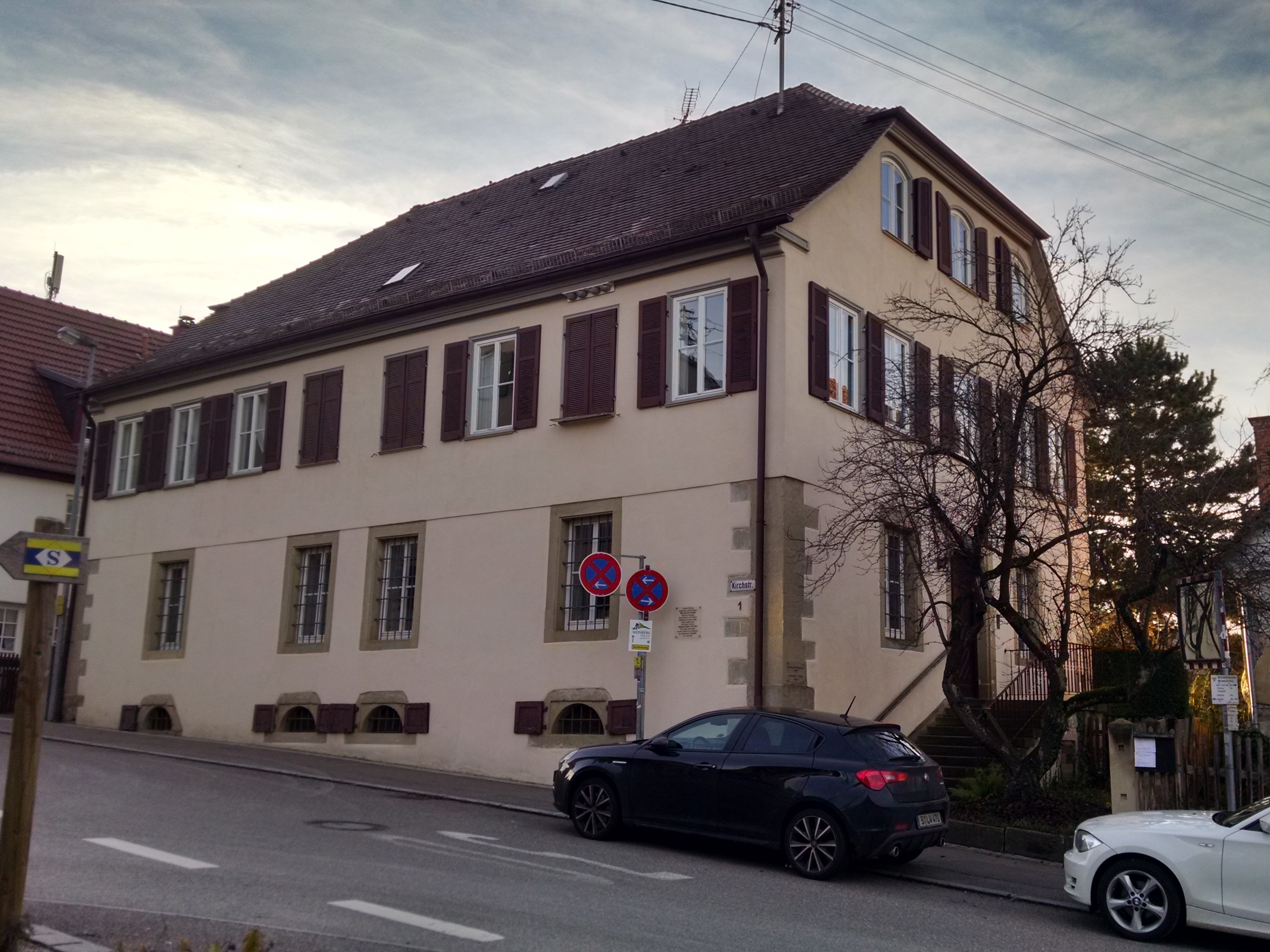 Kernen-Stetten, Kirchstraße 1.